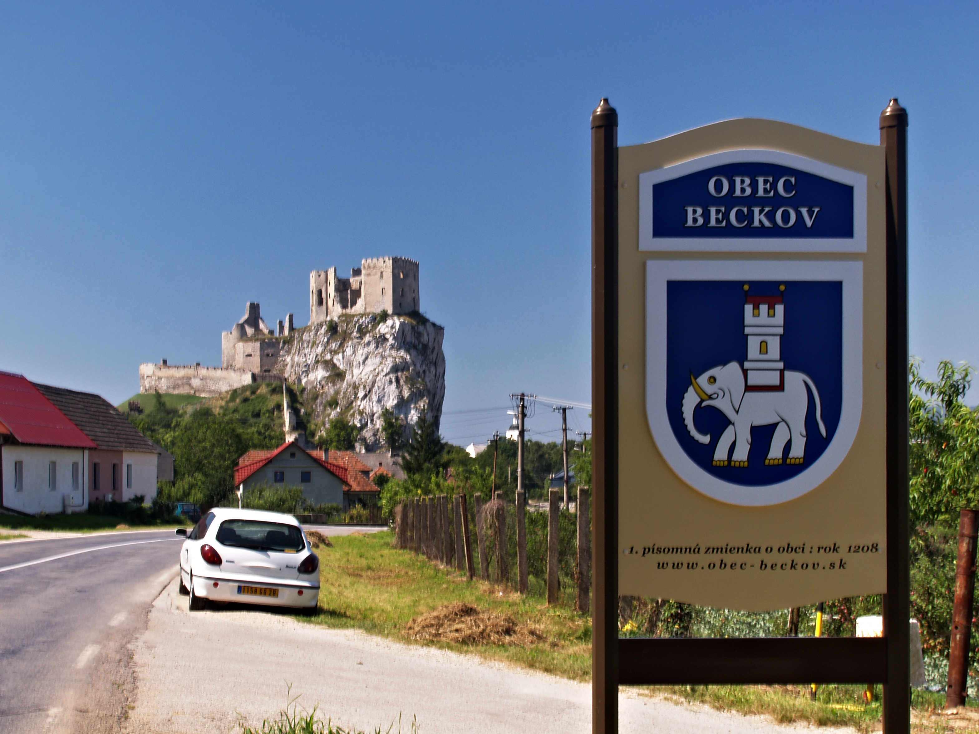 Beckov (Slovakia) - Panneau d'entrée du village